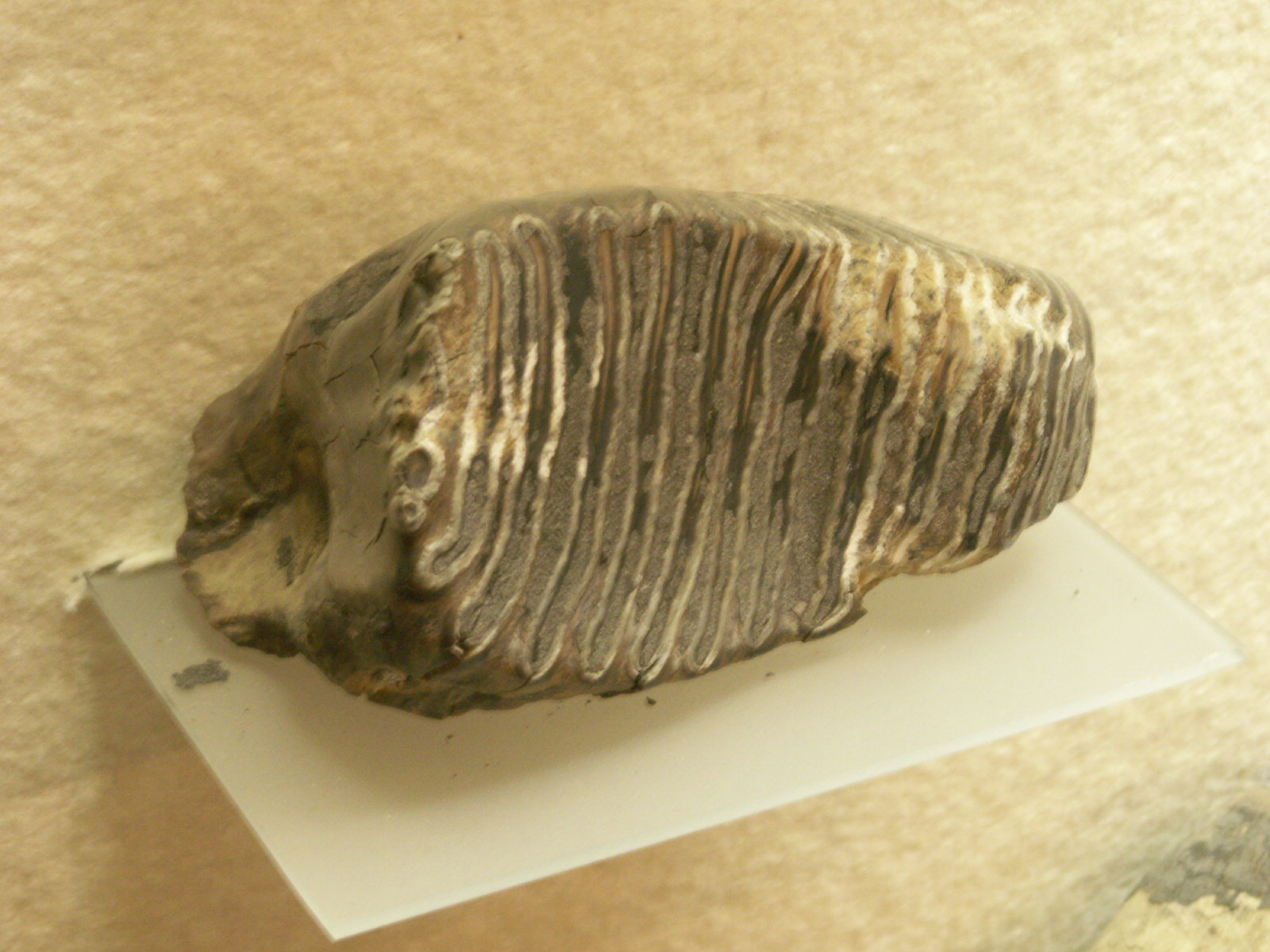 Ezt a képet személyesen készítettem a szekszárdi Wosinsky Mór Megyei Múzeumban. Gyapjas mamut fogat ábrázol.